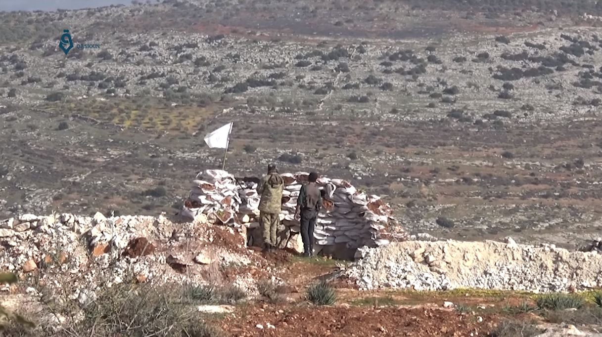 Rebelles de la 23e division de l'Armée syrienne libre, près d'Afrine, le 7 février 2018.